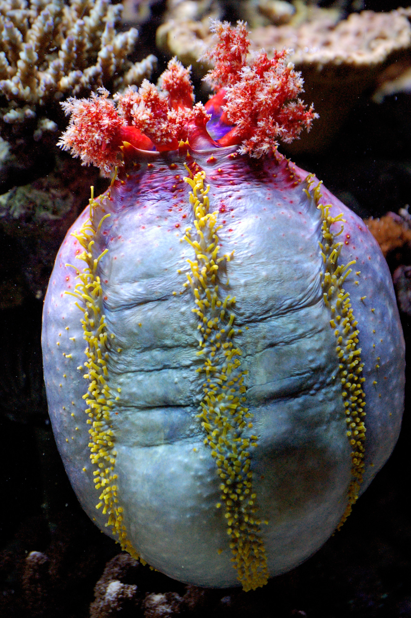 Pseudocolochirus axiologus (senior synonym: Pseudocolochirus violaceus)